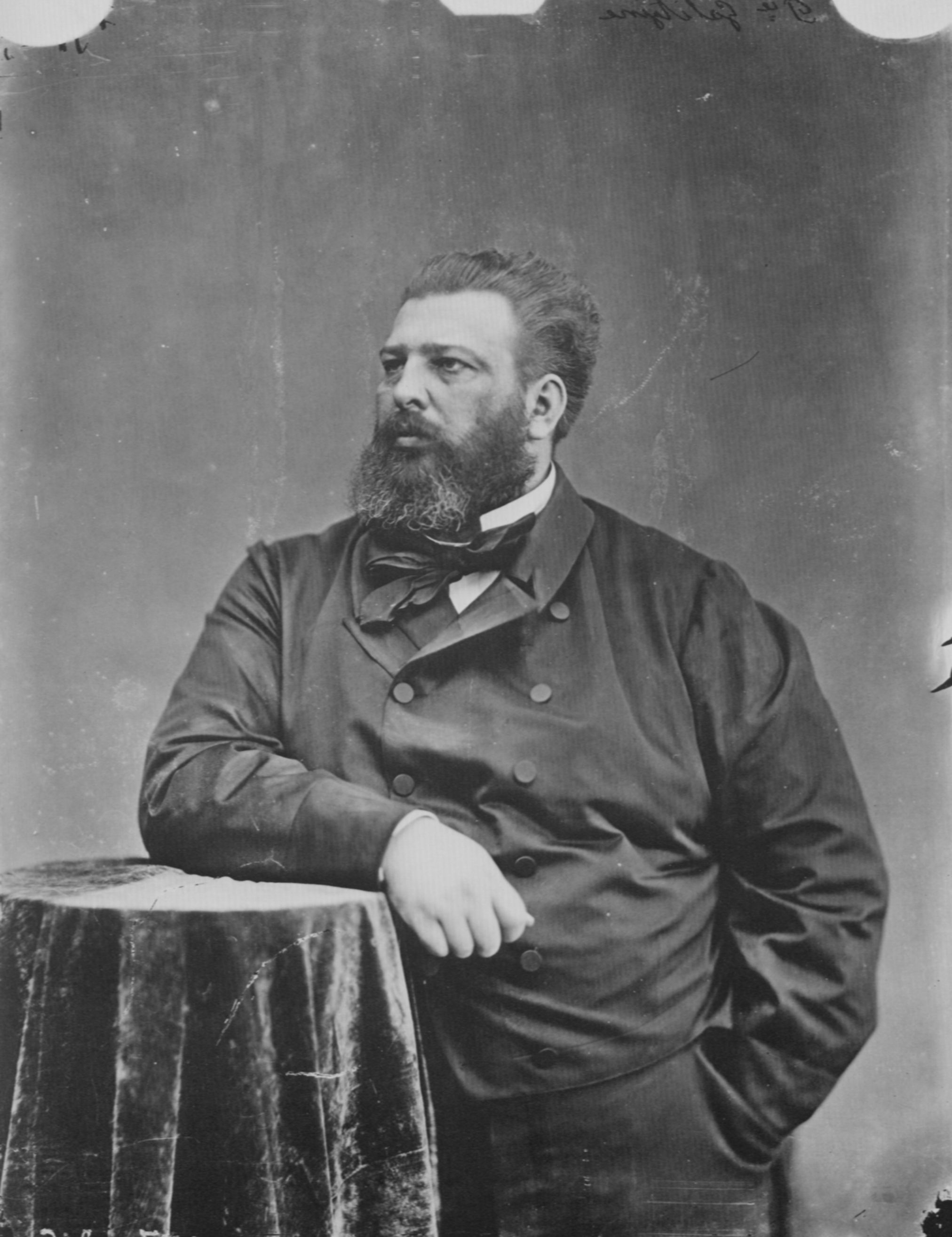 Tournachon, Gaspard-Félix: Georges Nikolaevitch, Prinz Galitzine (1823-1872)